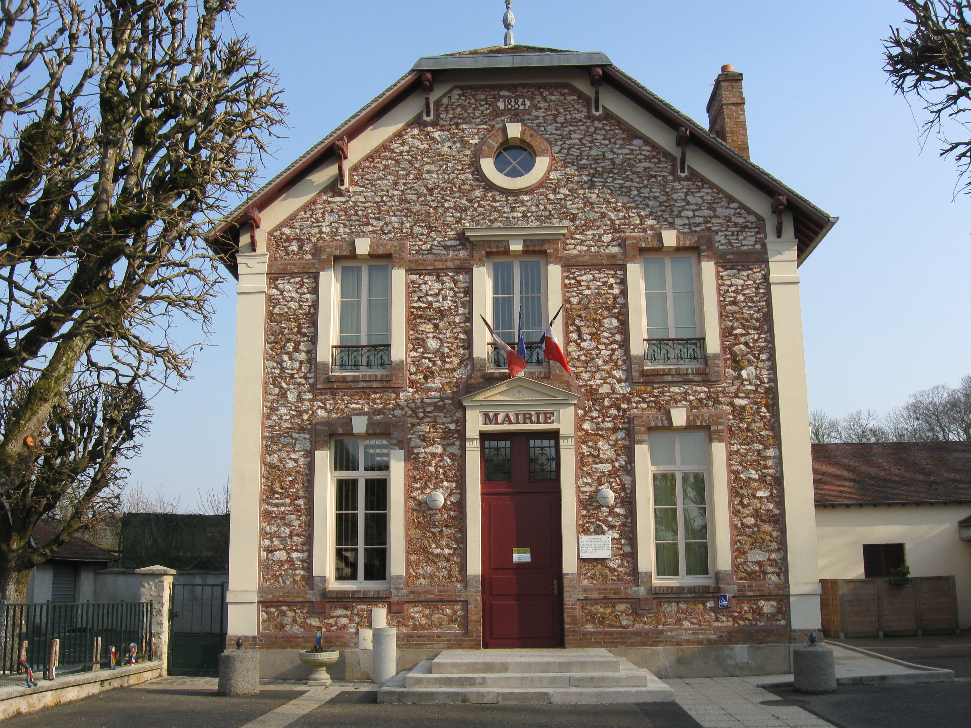 Mairie de Saint-Germain-Laxis. (Seine-et-Marne, région Île-de-France).